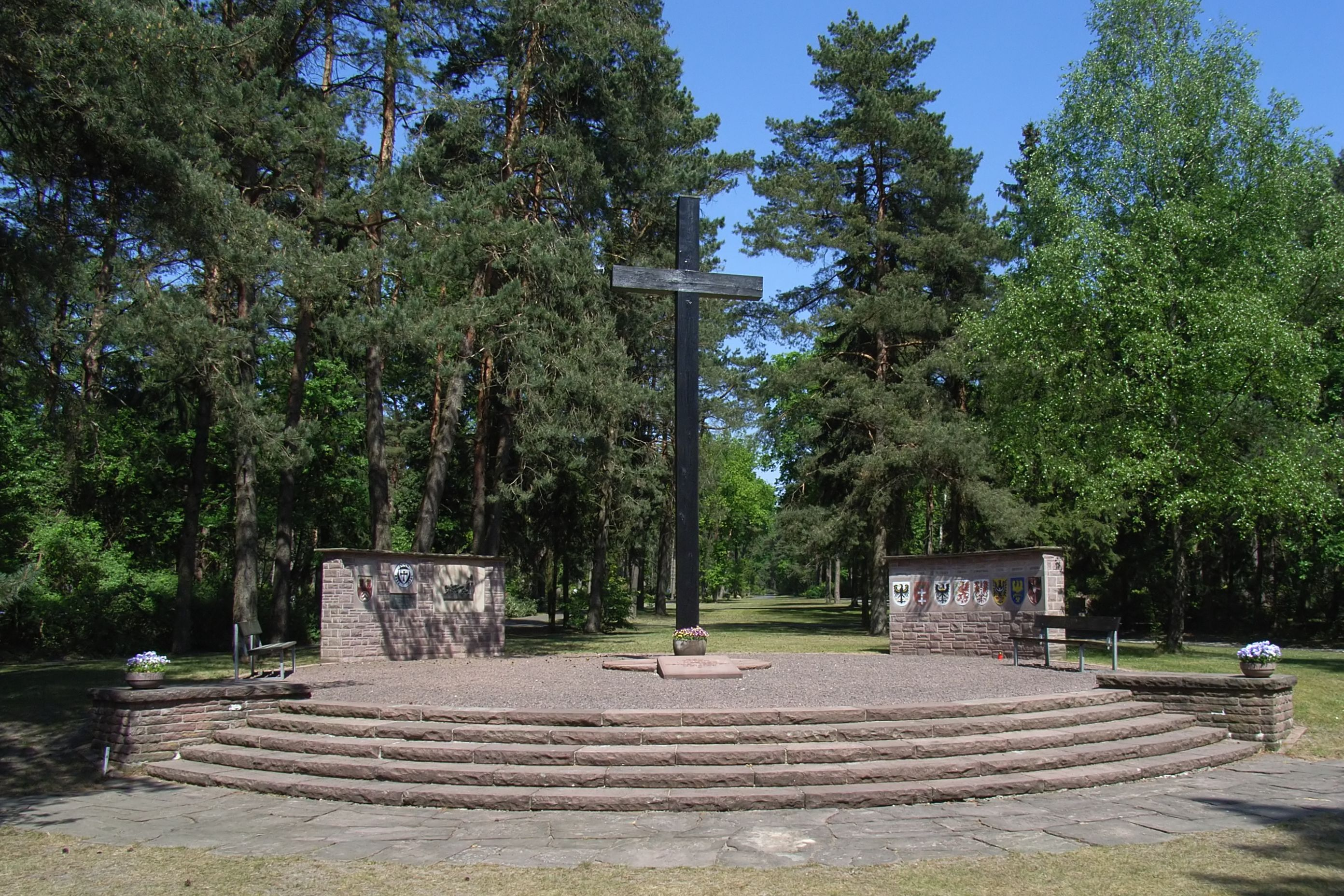 Bielefeld, Deutschland: Gedenkstätte für die Vertriebenen aus den Ostgebieten des Deutschen Reiches auf dem Sennefriedhof